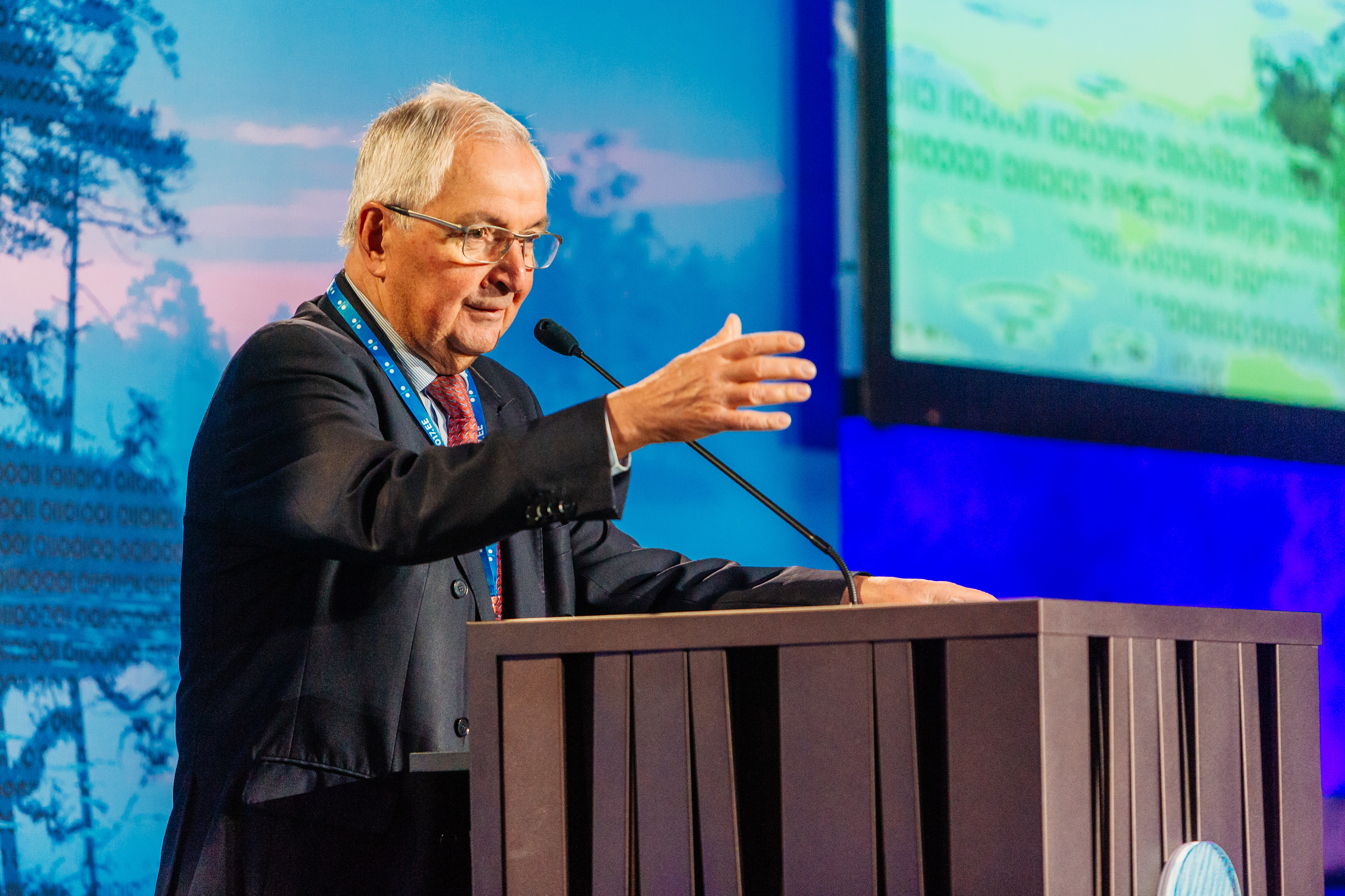 Klaus Töpfer, Germany, Potsdam IASS Photo: Arno Mikkor (EU2017EE)